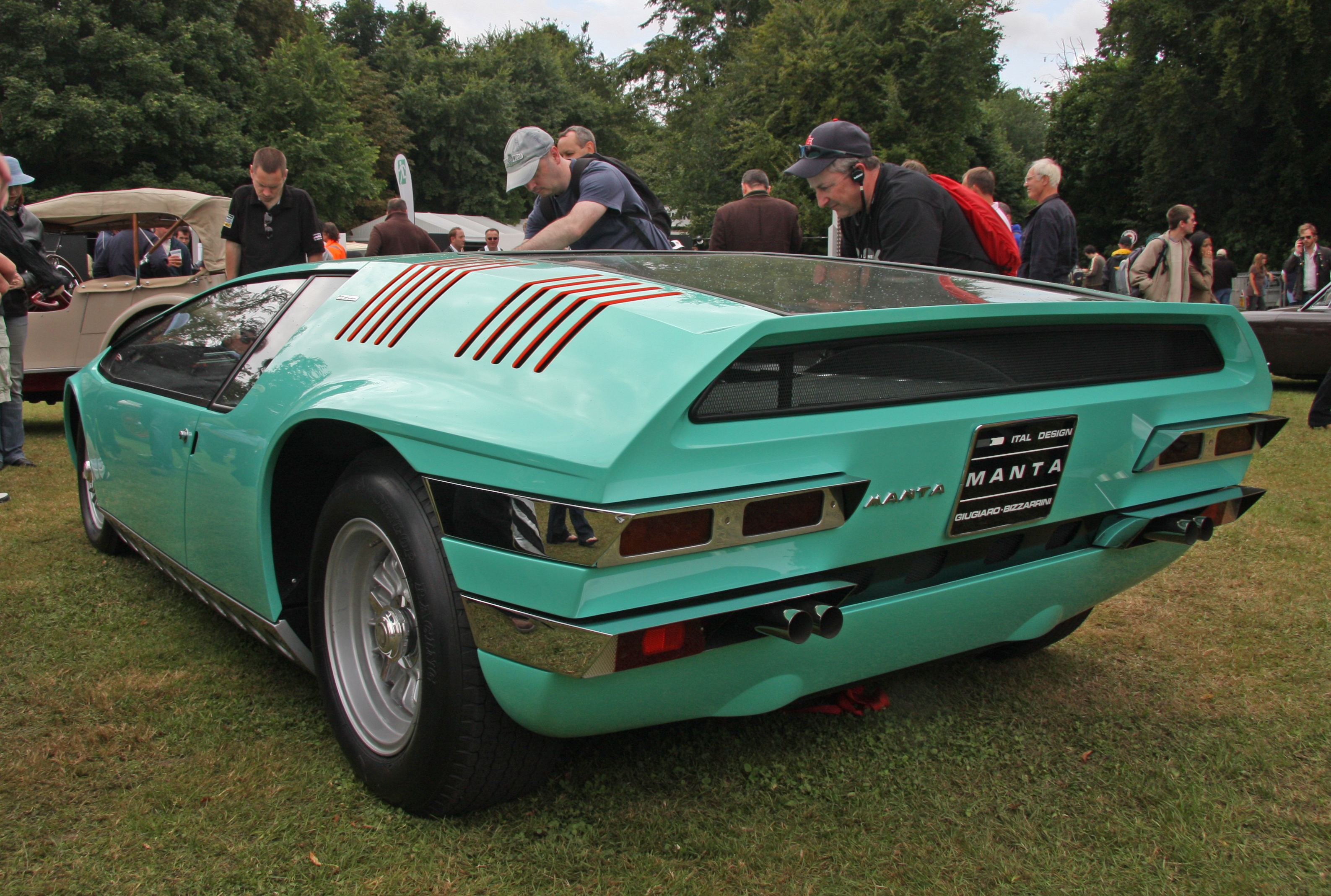 A Bizzarrini Manta